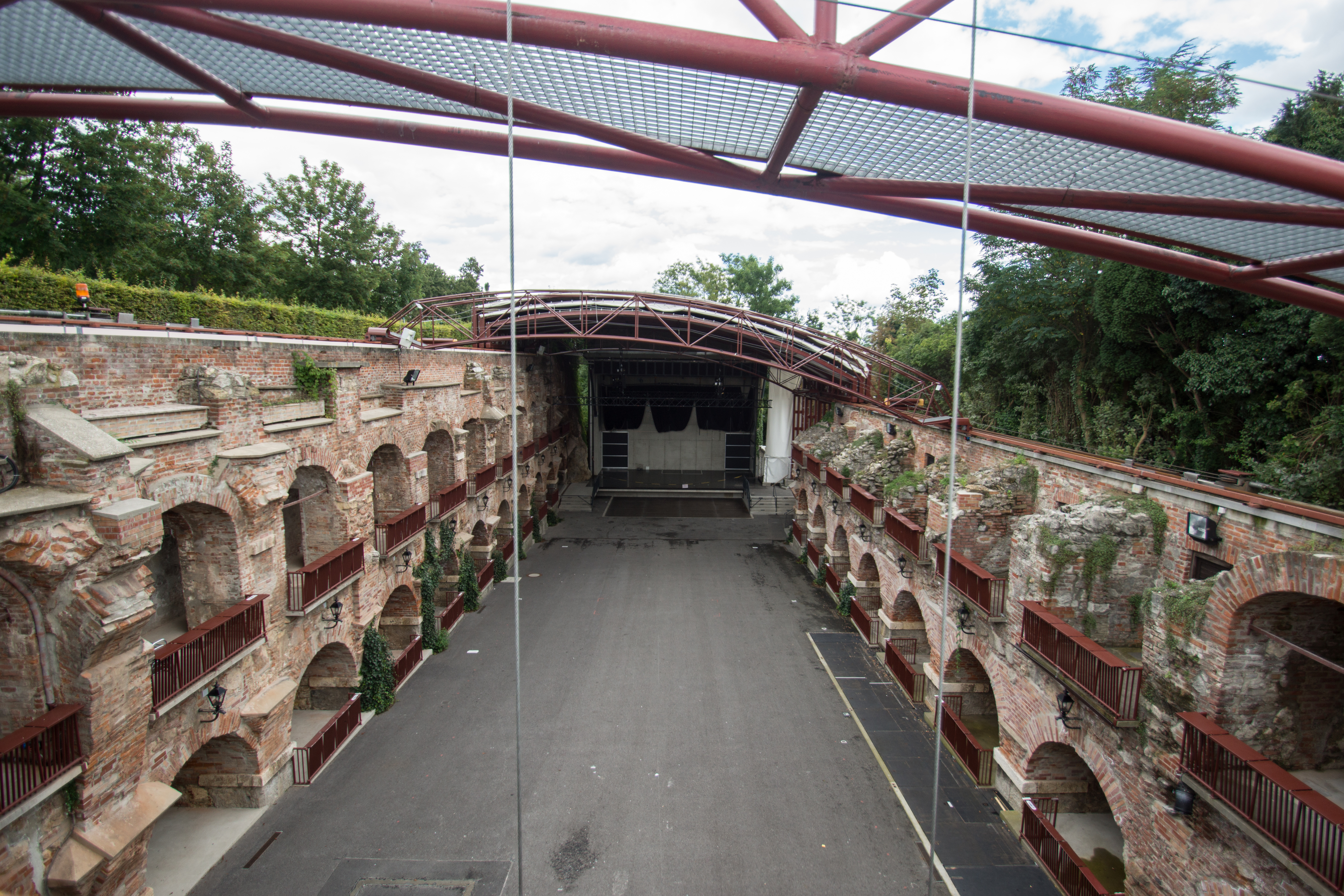 Teatro en Schlossberg